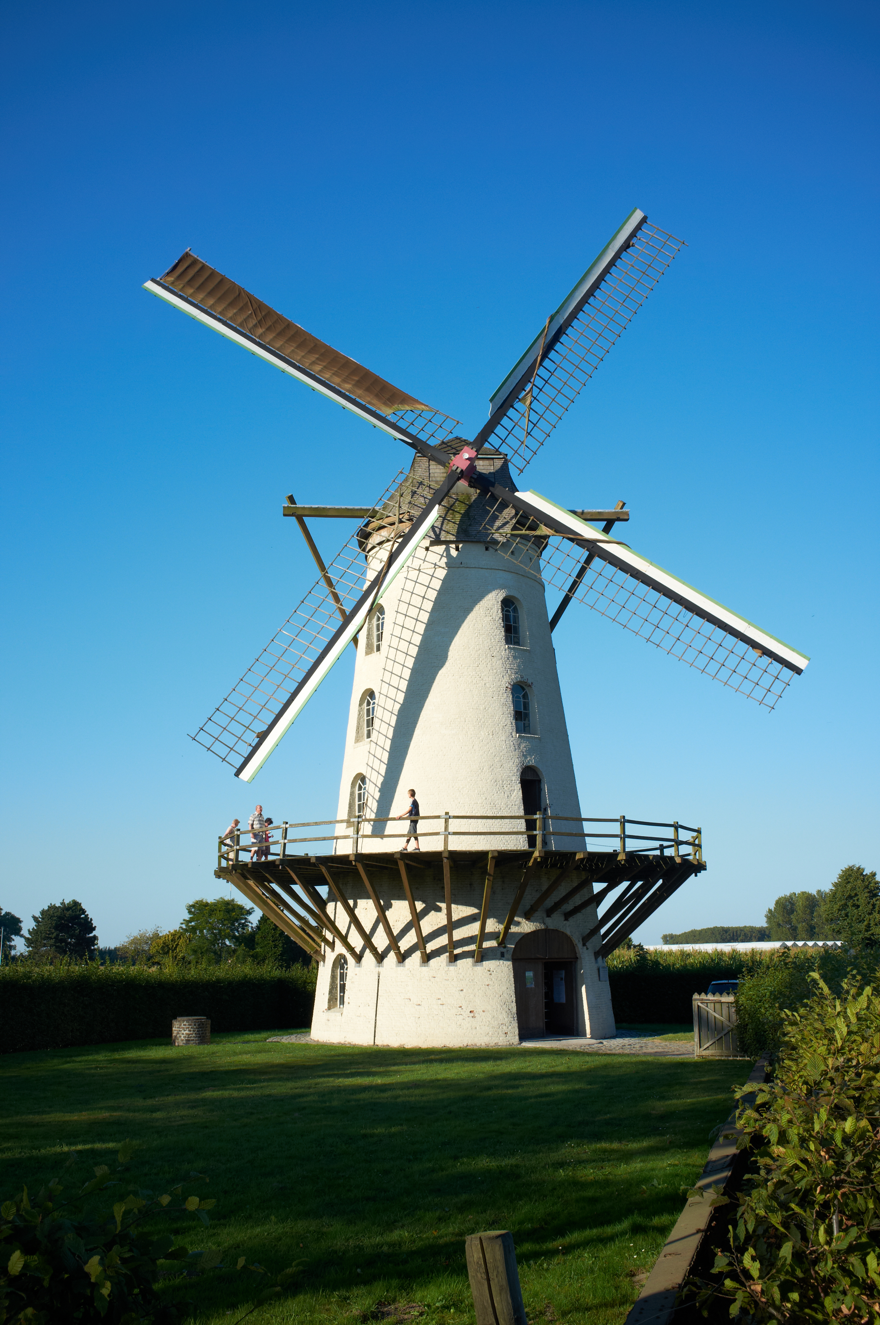 Windmolen. Focouniersmolen in oordegem (B)